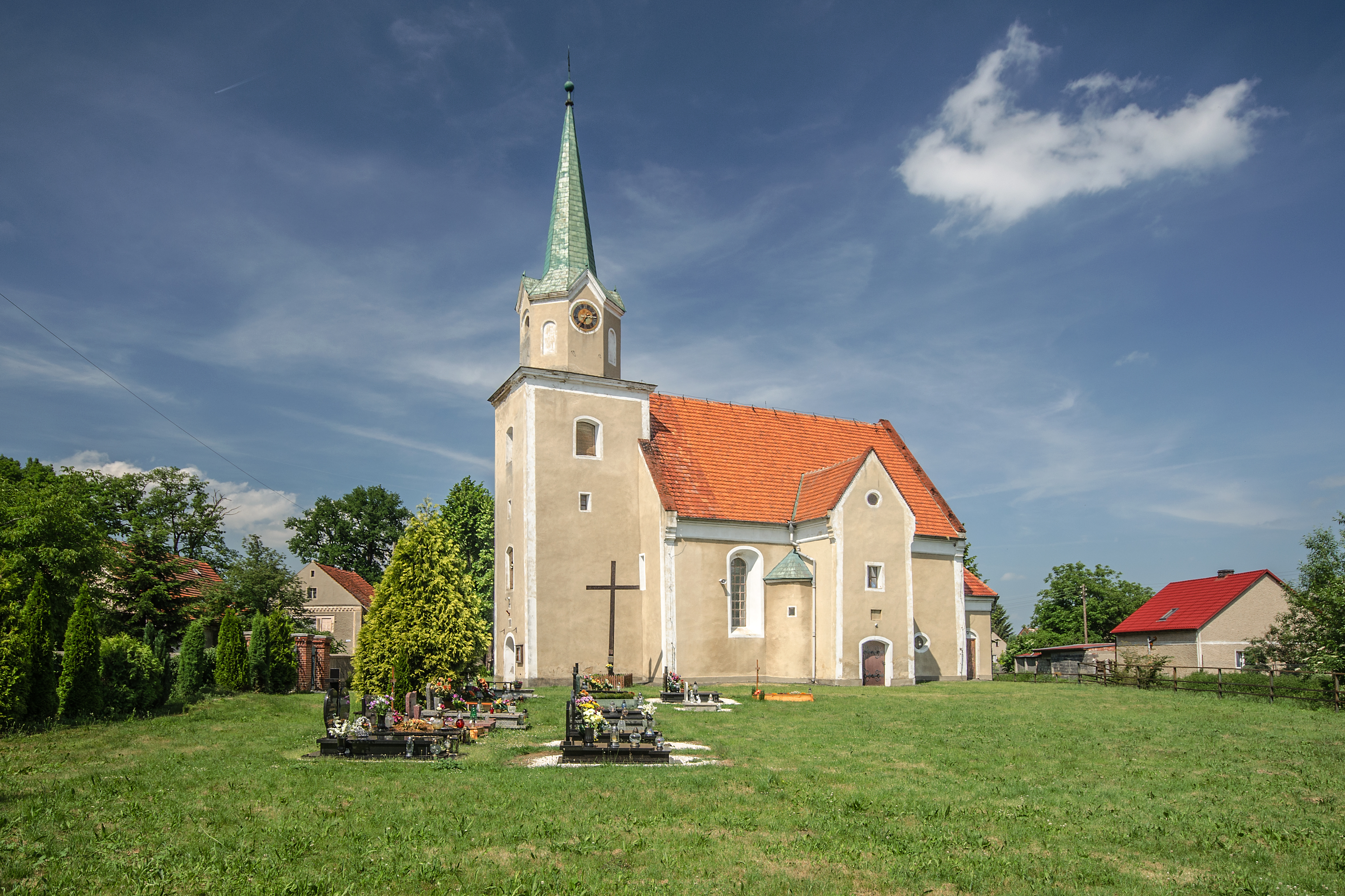 Świątniki, kościół dworski, ob. rzym.-kat. fil. p.w. Matki Boskiej Bolesnej, 1867